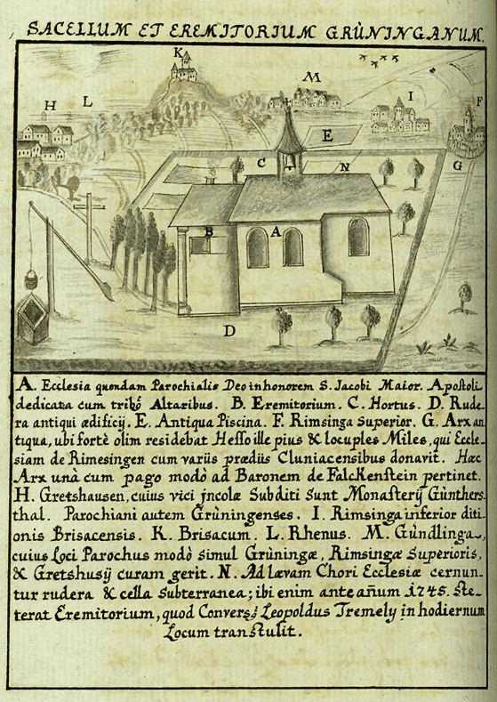 Priorat Grüningen mit Beschreibung